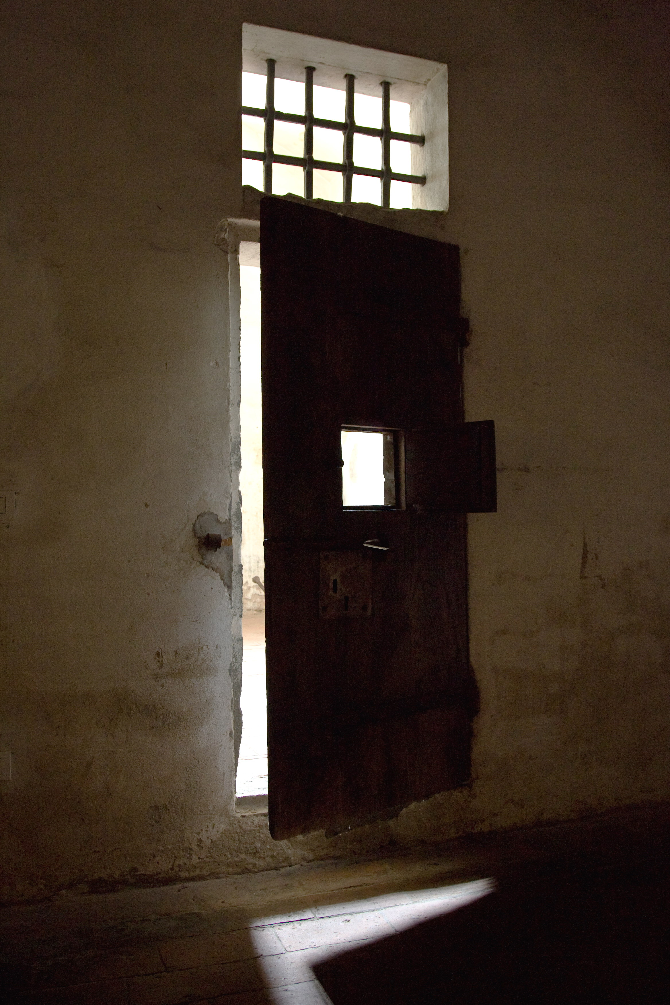 Una cella del Palazzo Pretorio di Vicopisano